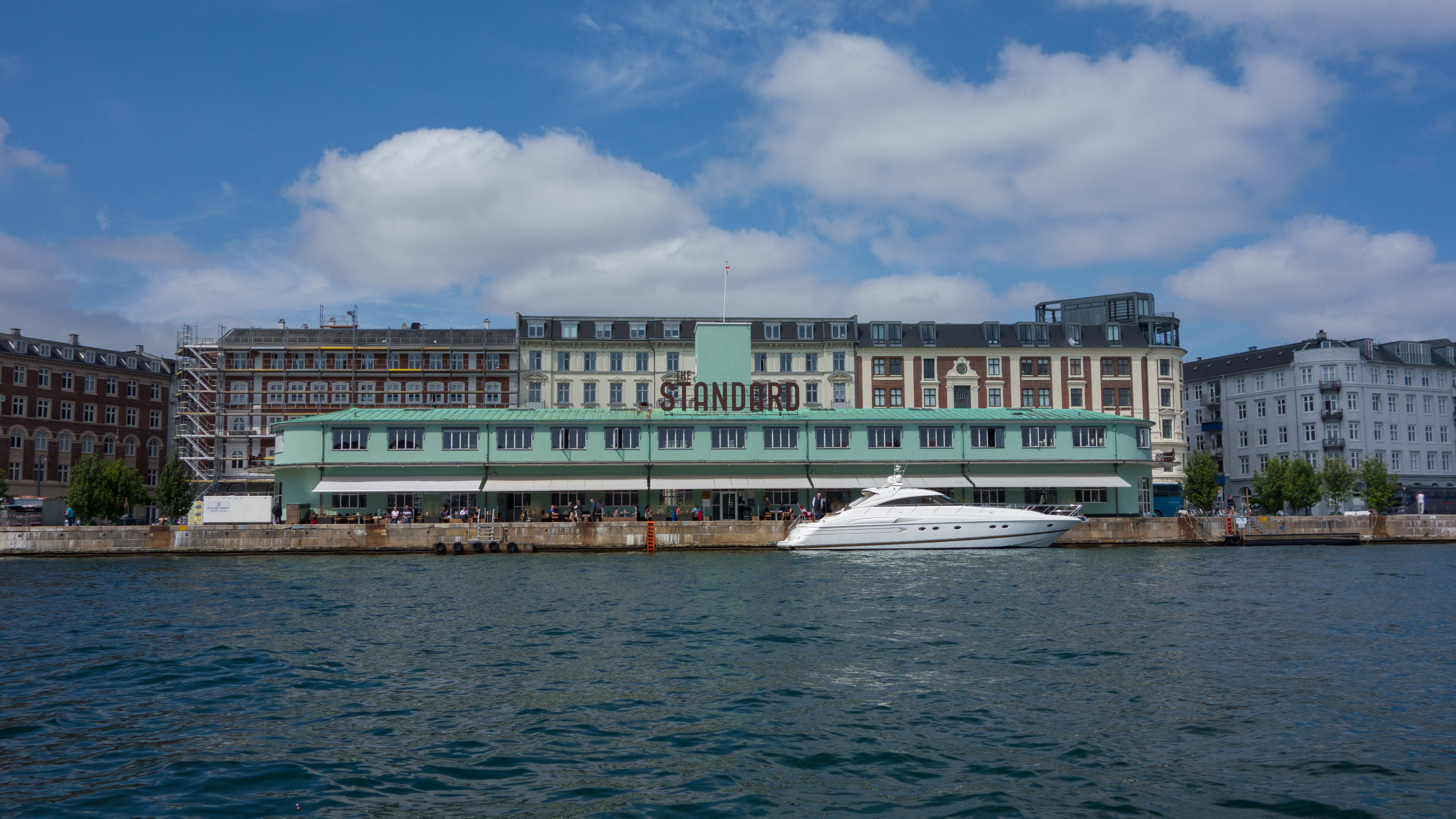 The Standard on Havnegade in Copenhagen, Denmark